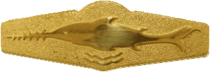 Tätigkeitsabzeichen für Schwimmtaucher der Bundeswehr Voraussetzungen: Erfolgreiche Teilnahme am Training „Schwimmtaucher“ (LgNr. 725368). Ausführung: Stilisierter Sägefisch auf Wellenlinien, metallgeprägt; nur goldfarben.